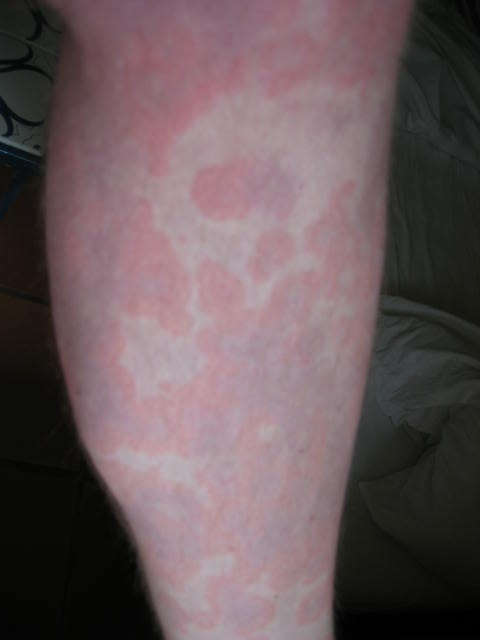 Urtikaria am Bein.